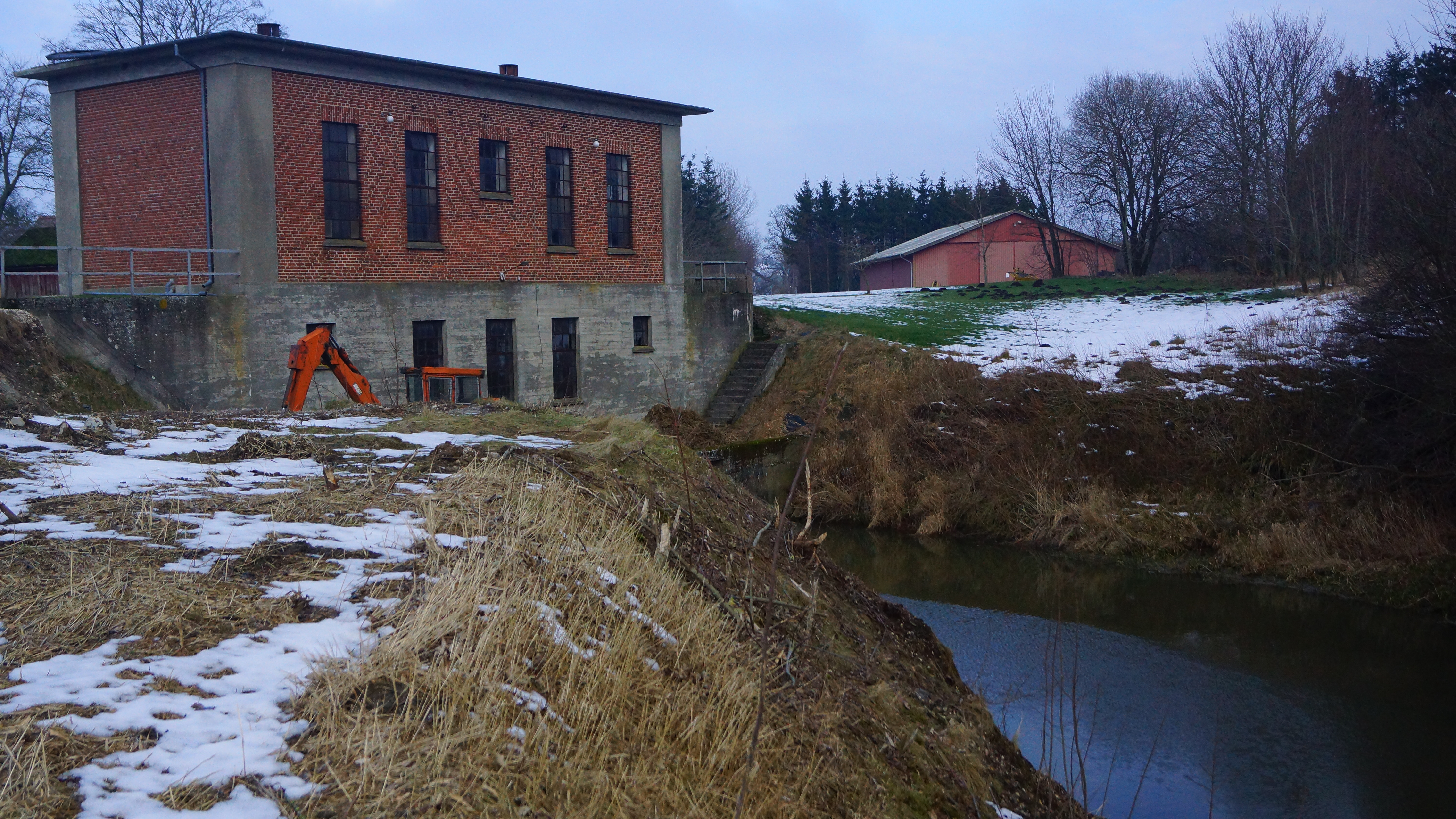 Kolindsund, pumpestationen i Fannerup